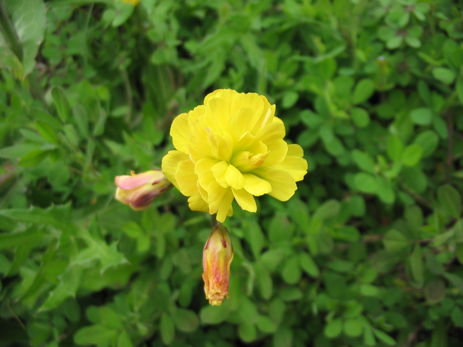 Nickender Sauerklee (Oxalis pes-caprae var. pleniflora) - Flower